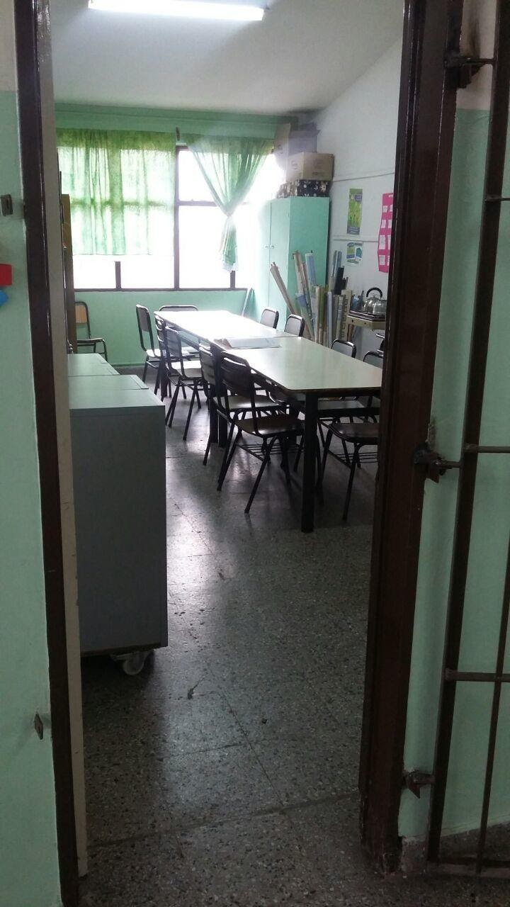 sala de la Escuela